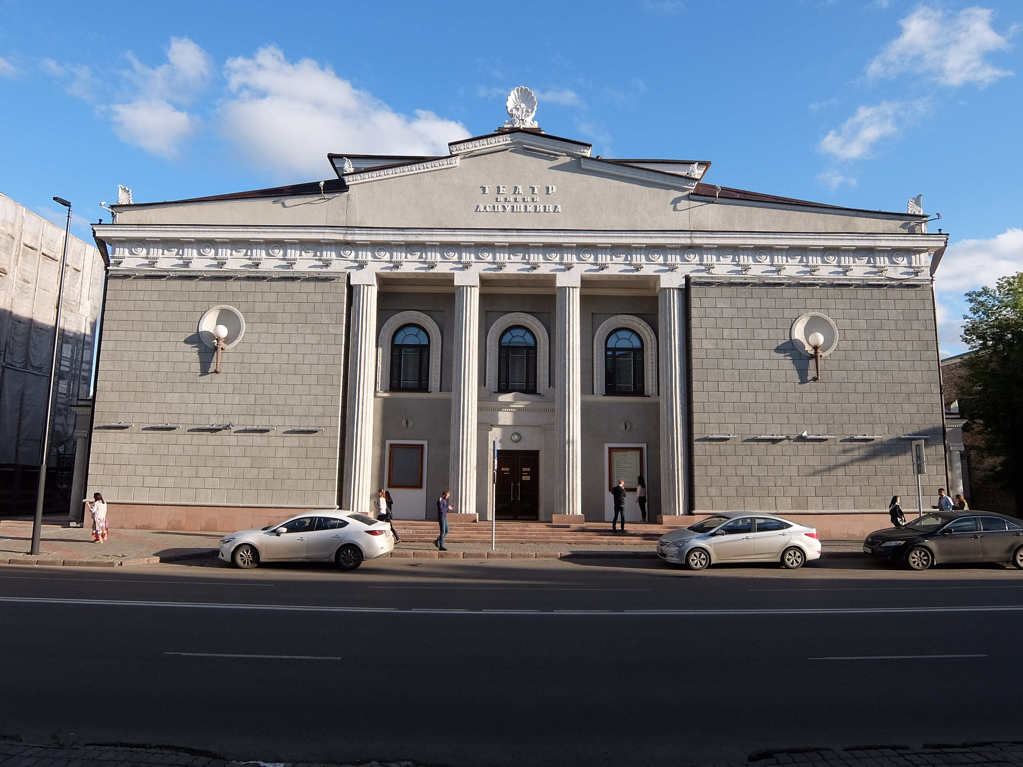 Здание Красноярского драматического театра им.А.С.Пушкина